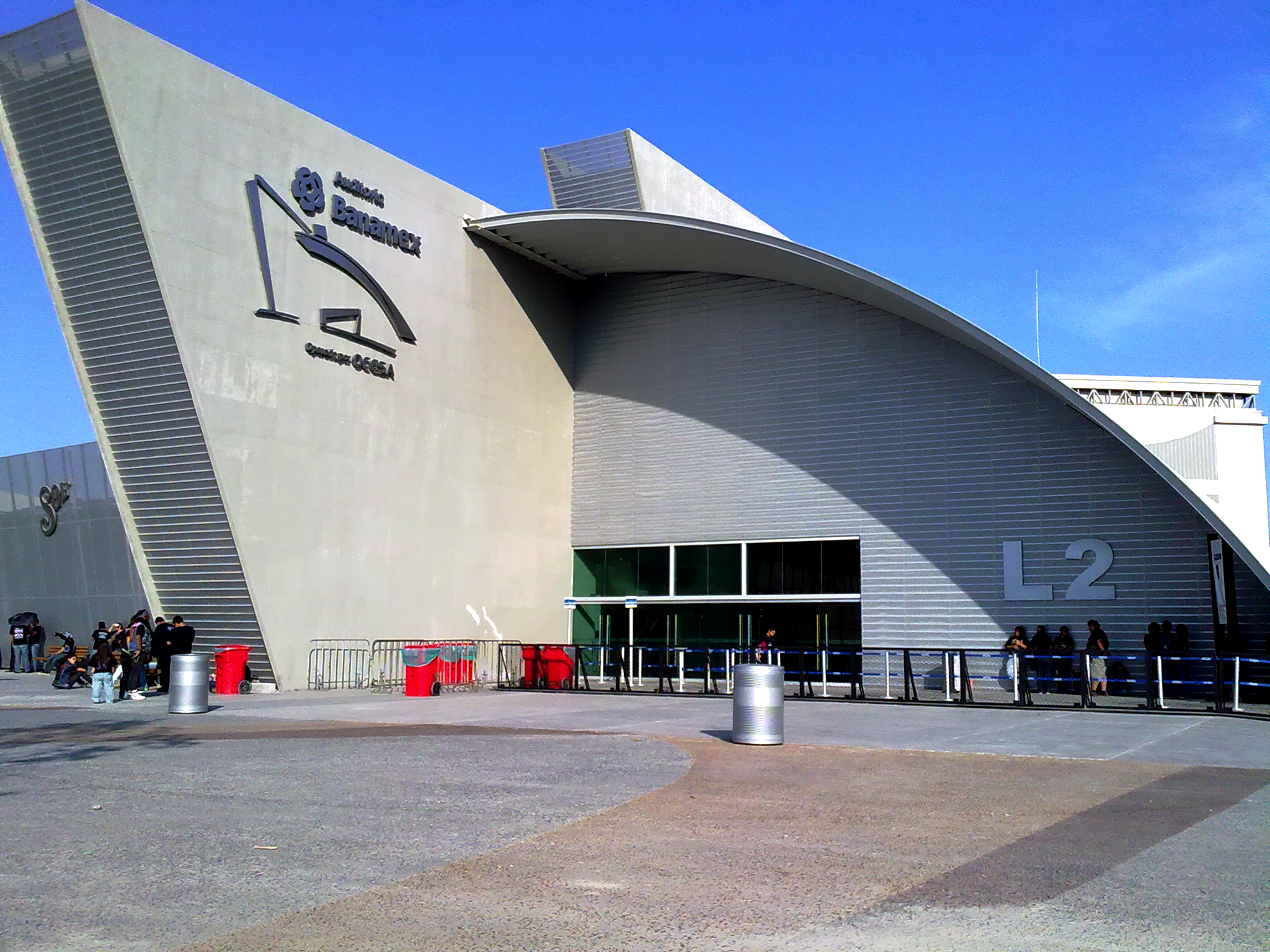 Lado 2 del Auditorio Banamex, Monterrey, Nuevo León.